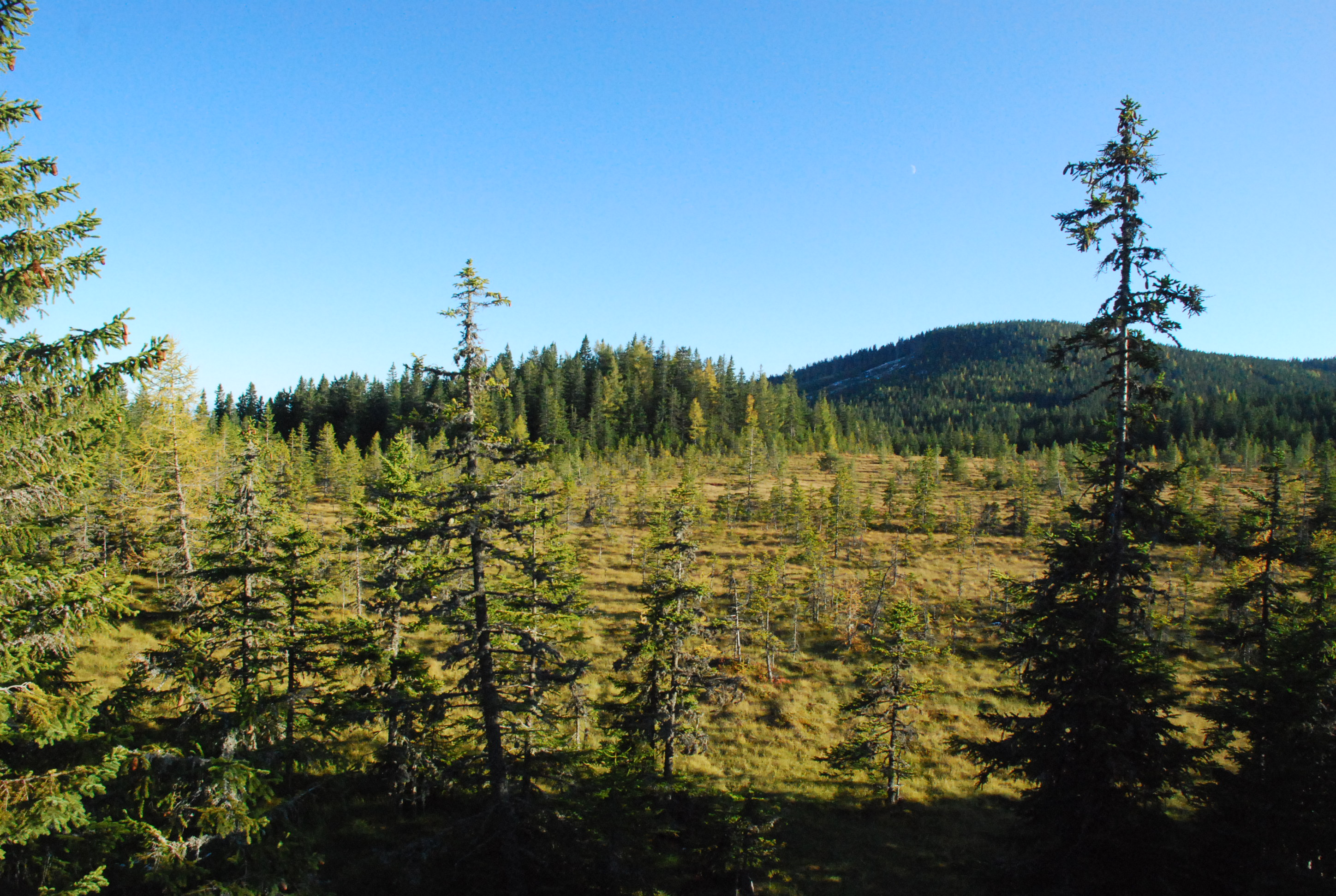 Die See Eben an der kärntner-steirischen Grenze auf der Koralpe, gesehen von der Aussichtsplattform aus Richtung Süden